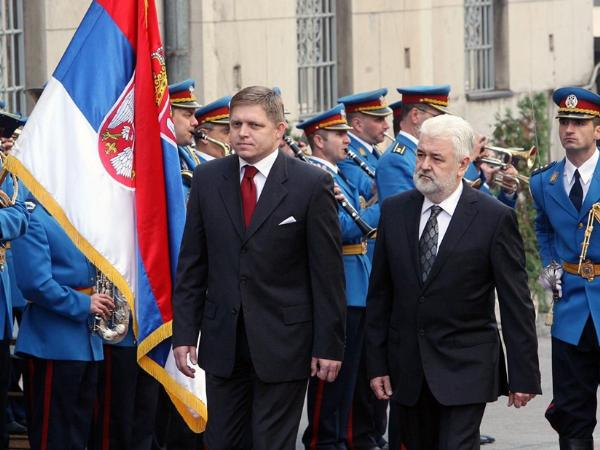 Mirko Cvetkovic, Prime Minister of Serbia and Robert Fico, Prime Minister of Slovakia